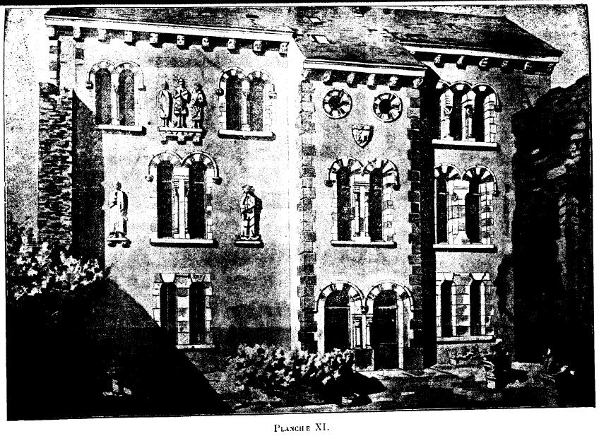 Le Donjon de Courmenant, ses origines, ses seigneurs et possesseurs, son musée